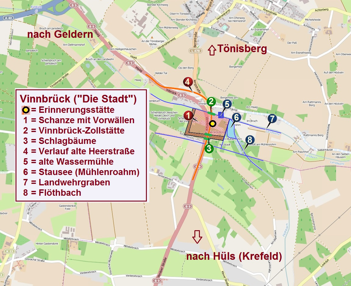 Lage der historischen Schanze Vinnbrück anno 1284 This map of Lage der historischen Schanze Vinnbrück 1284) was created from OpenStreetMap project data, collected by the community. This map may be incomplete, and may contain errors. Don't rely solely on it for navigation.